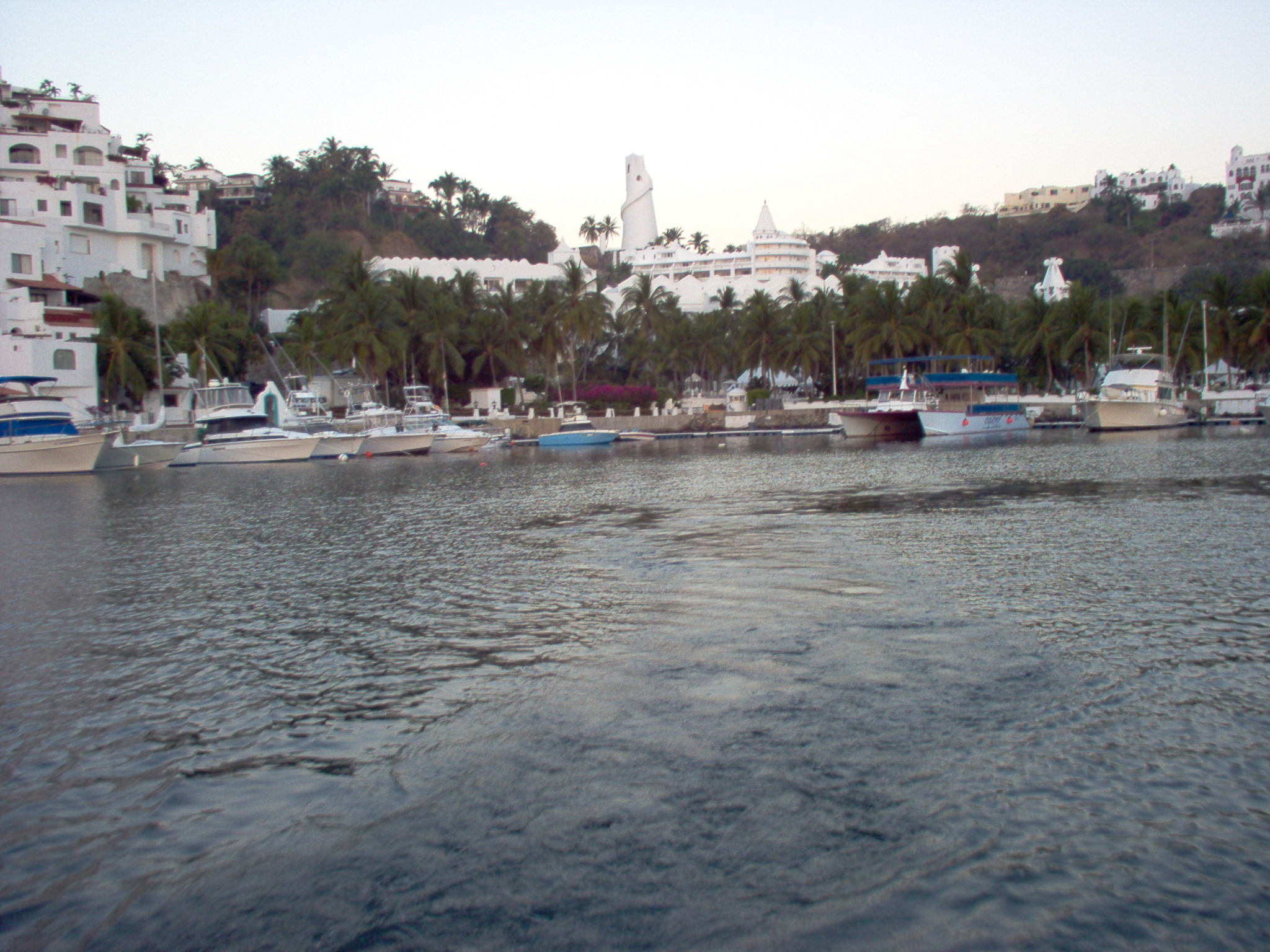 Vista Las Hadas desde embarcación "La Esperanza".